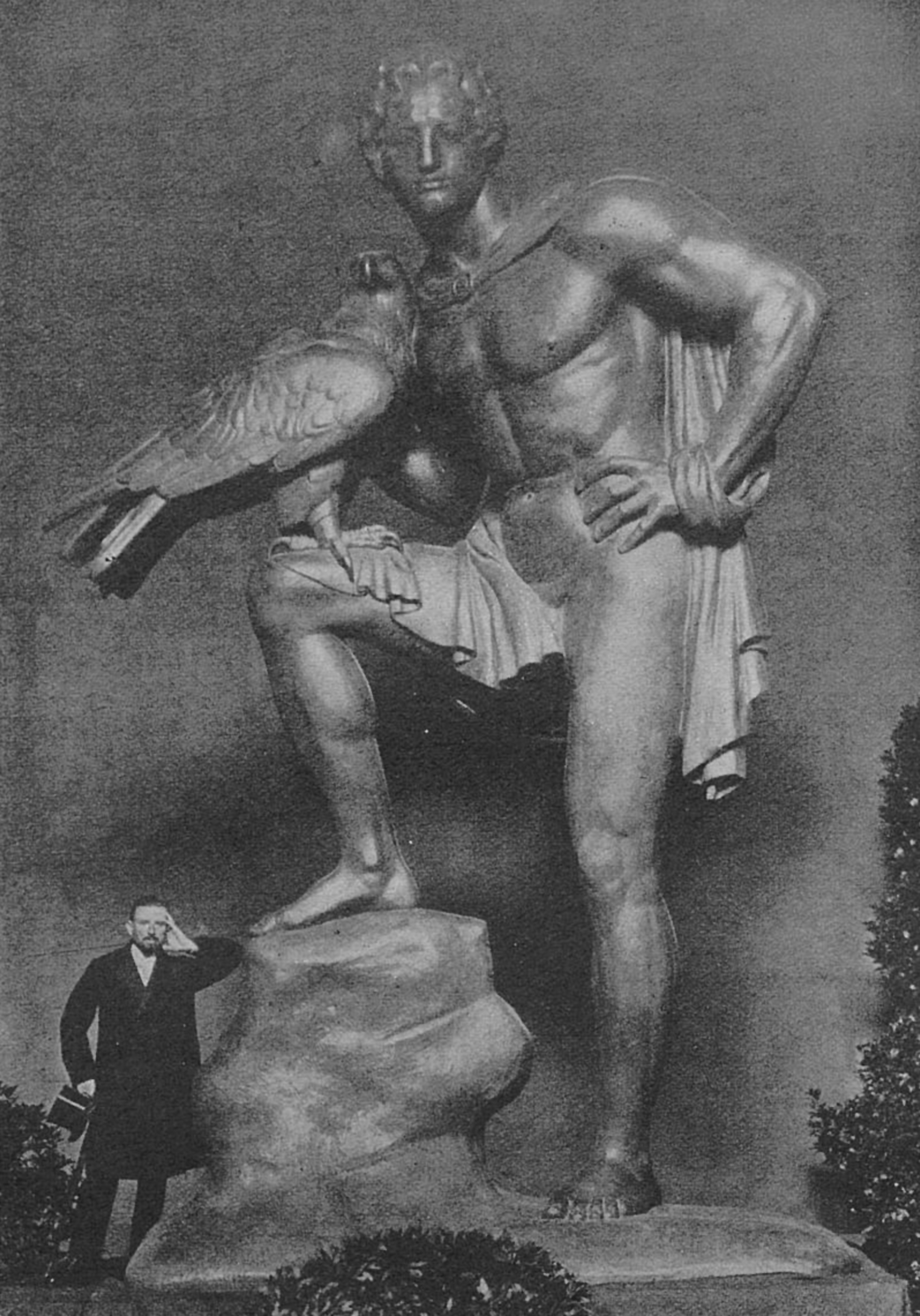 Goethes Genius, Goethedenkmal für Chicago, geschaffen im Auftrag des dortigen Schwabenvereins von Prof. Hermann Hahn (neben dem Denkmal stehend) in München. Das 80 Zentner schwere Werk wird auf dem Lincoln-Platz in Chicago aufgestellt. Rhein und Düssel vom 11. Oktober 1913